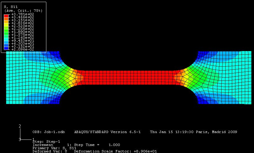 contraintes xx traction1